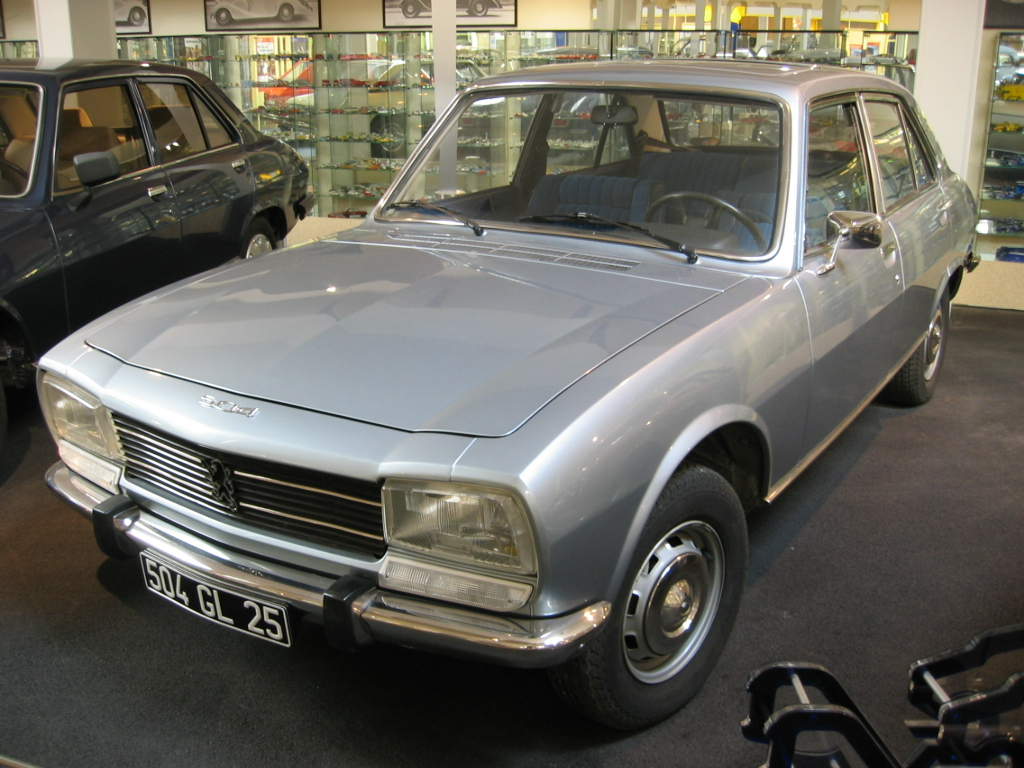 Peugeot 504 - Musée Peugeot de Sochaux